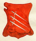 Stemma della famiglia Mannelli